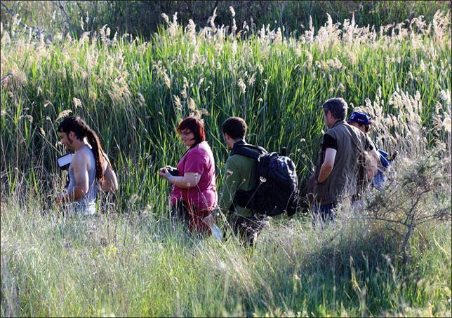 Los participantes al I-Testing-Tablas-de-Daimiel-215765 buscando seres vivos para fotografiar